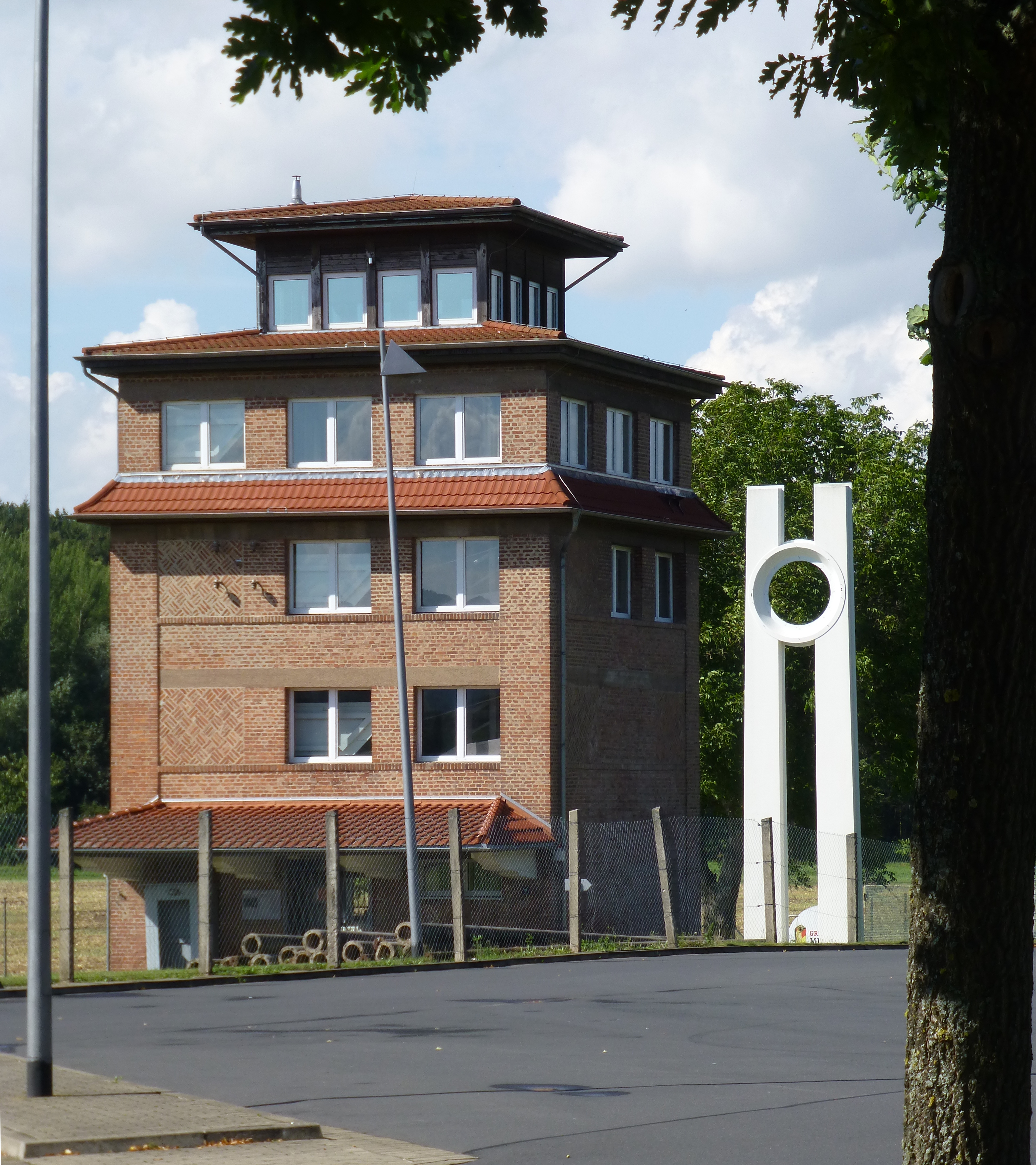 Gebäude am ehemaligen Grenzübergang Duderstadt-Worbis an der ehemaligen innerdeutschen Grenze, heute Grenzlandmuseum (der Mühlenturm war bis in die 70er Jahre Teil der "Unteren Klostermühle" in Teistungen und ist als einziges Gebäude im Rahmen der Errichtung der Grenzübergangsstelle erhalten geblieben und zum Beobachtungsturm umgebaut worden)